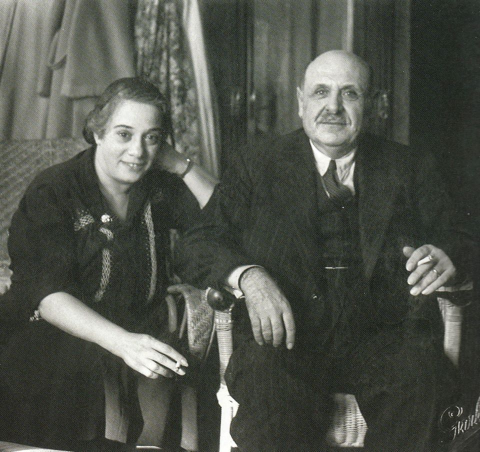 تبين الصورة بشارة الخوري أول رئيس جمهورية للبنان بعد استقلال البلد عن فرنسا وزوجته